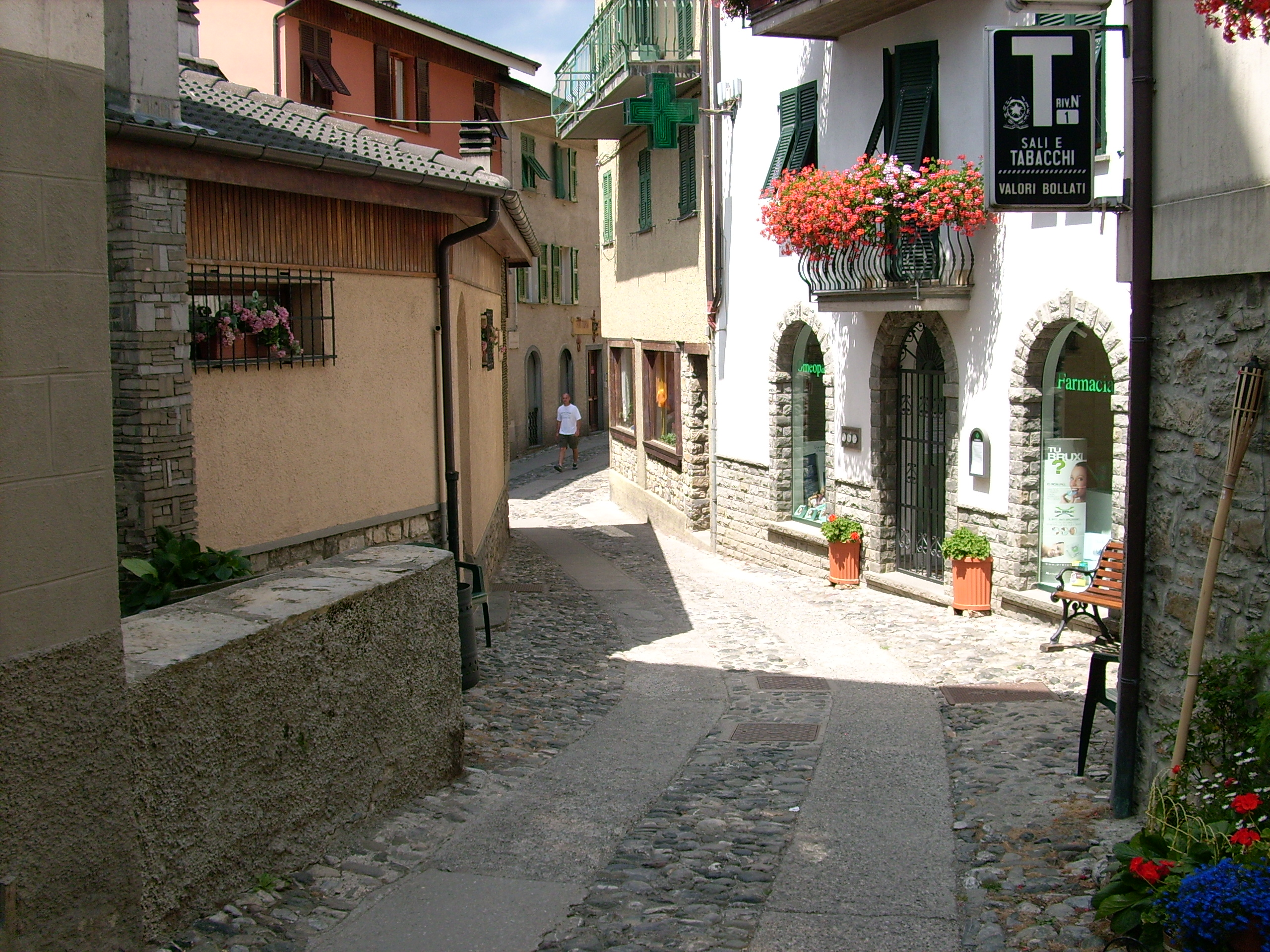 Santo Stefano d'Aveto, Liguria, Italia